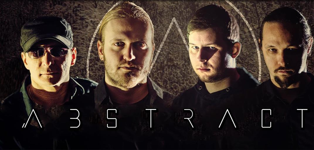 Skupinová fotografia členov banskobystrickej inštrumentálno-metalovej skupiny Abstract z roku 2015. Na fotografii sú zachytený členovia skupiny Abstract v tomto poradí zľava: Peter Lengsfeld (gitara), Matej Húšťava (sólová gitara), Juraj Drugda (bicie) a Tomáš "Julo" Balon (basová gitara).